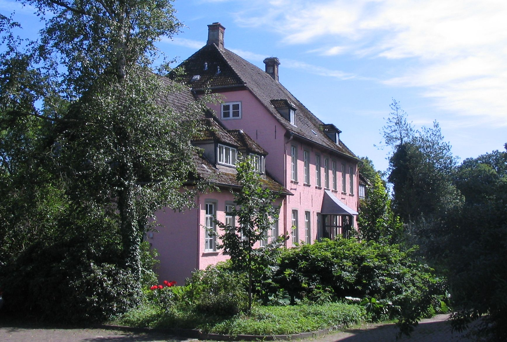 Dammgut in Ritterhude, Niedersachsen.